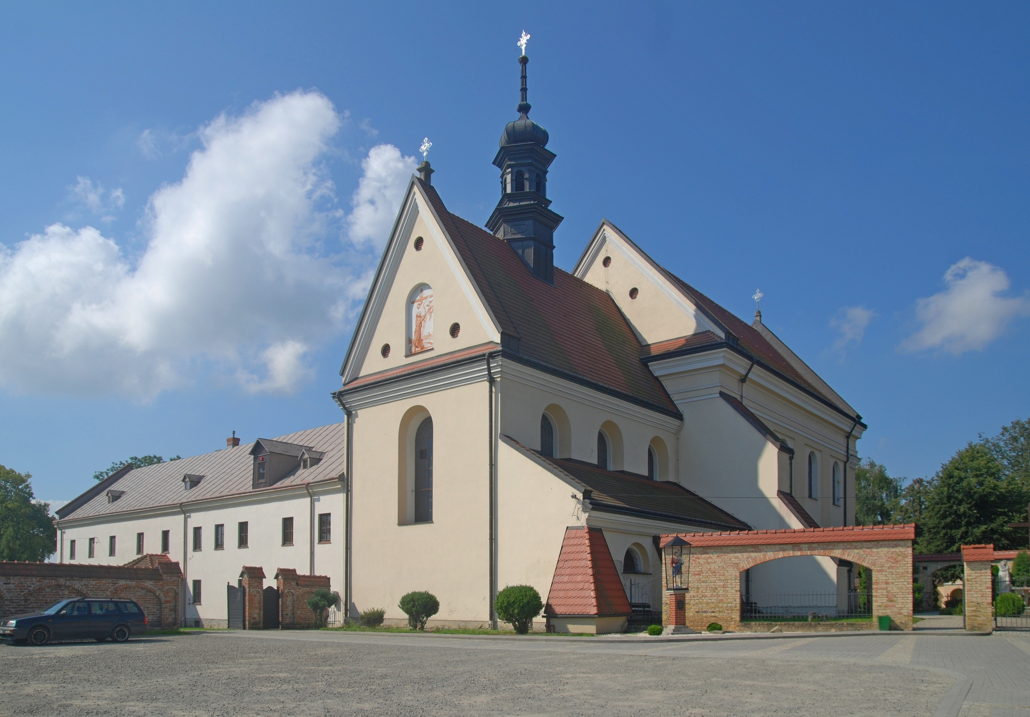 miasto Biecz